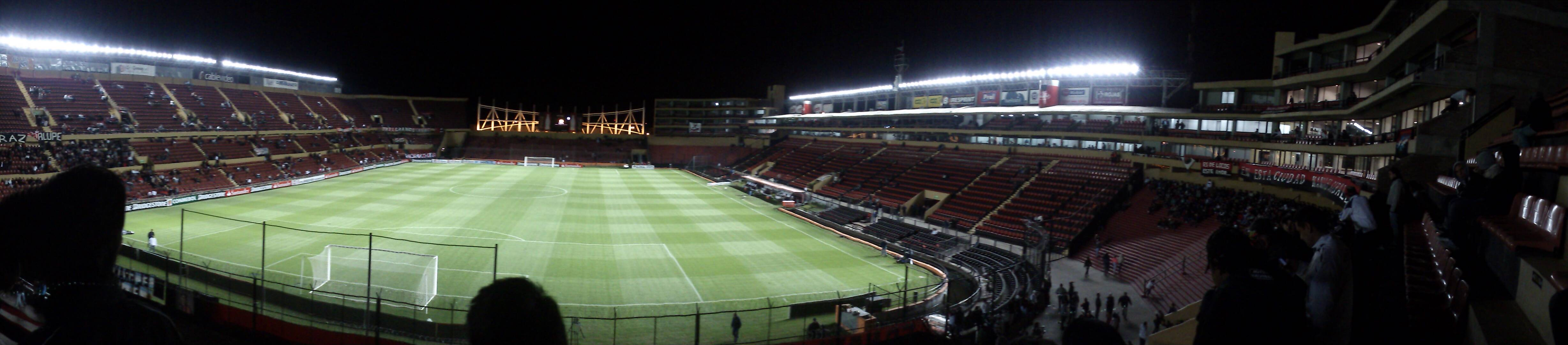 Previo al Partido Colón - Racing por la Copa Sudamericana 2012